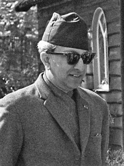 Nepalese koning Mahendra op staatsbezoek in Nederland.